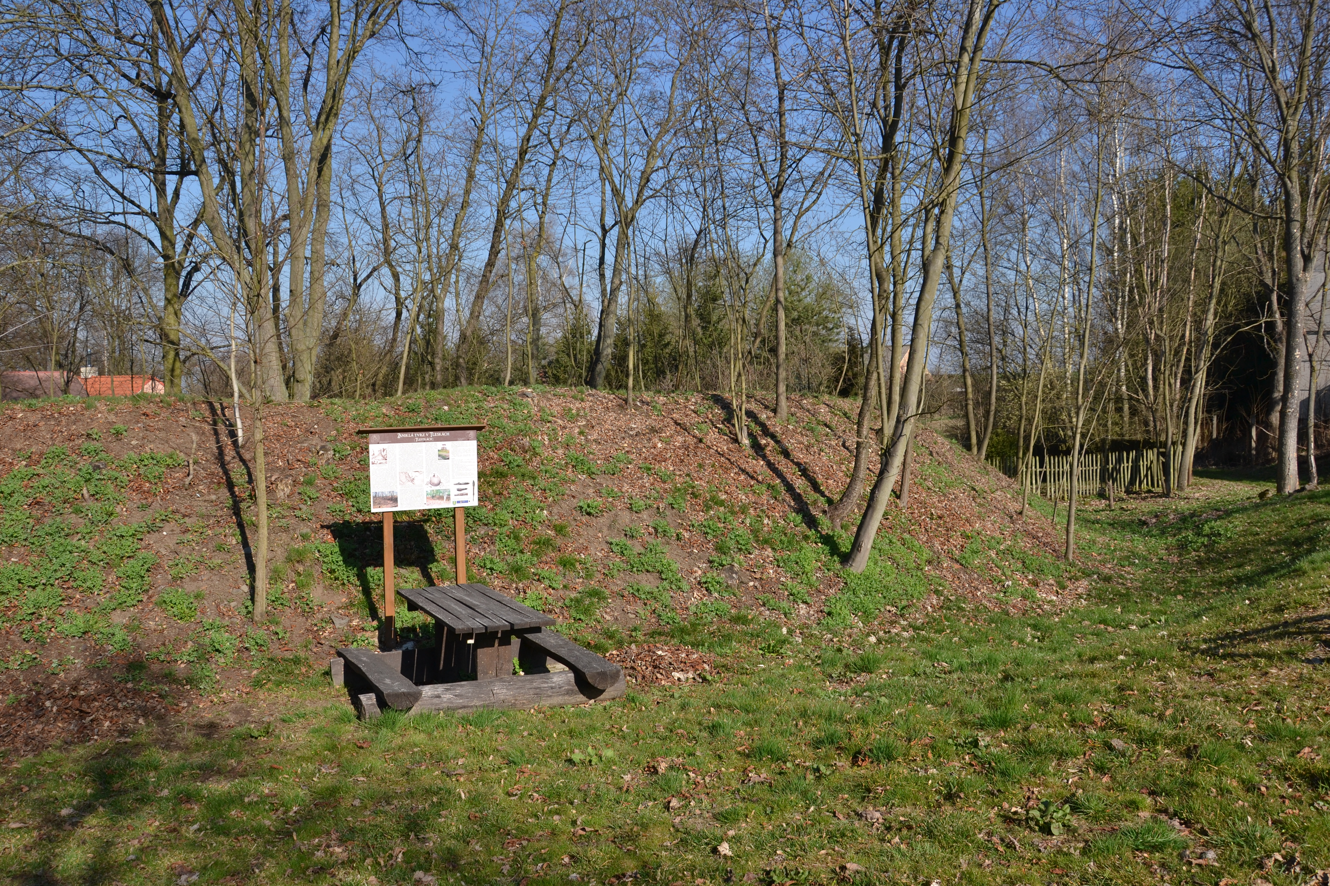 Tlestky – celkový pohled na tvrziště